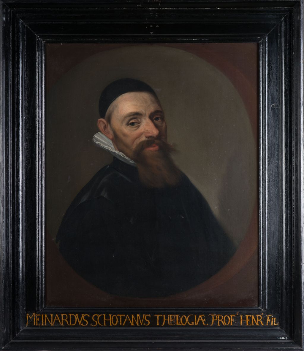 Portret in olieverf van Meinardus Schotanus, professor in de godgeleerdheid aan de Franeker universiteit van 1626 tot 1632 en van 1636 tot 1637. Meinardus Schotanus (Franeker 13 oktober 1593 - Utrecht 6 (8?) april 1644) studeerde theologie in Franeker.